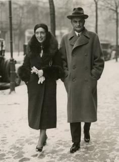 Hatvany Lajos feleségével Berlinben